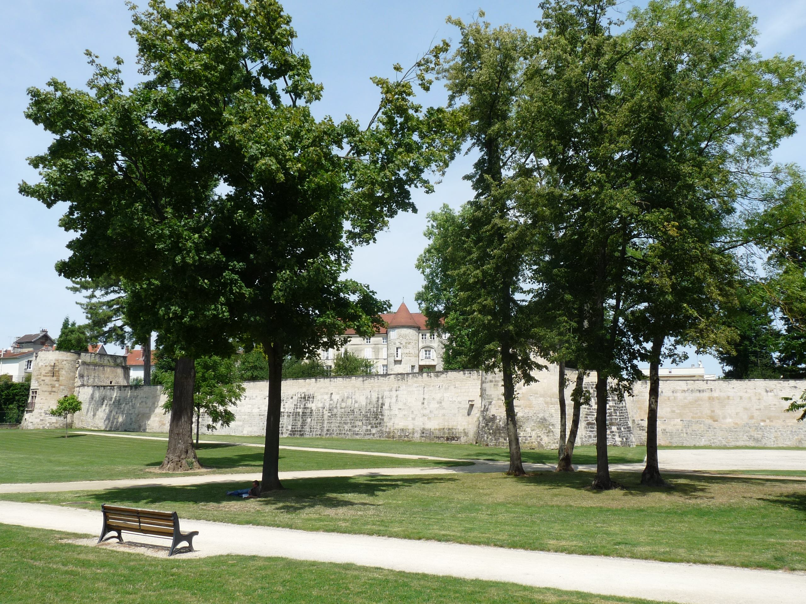 Festungsanalagen in Saint-Dizier, Haute-Marne, Frankreich